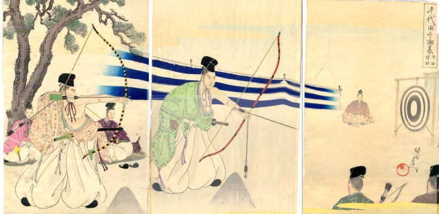 弓術。『千代田之御表』より。明治三十年(1896年)発行。発行者：福田初治郎。作画：揚洲周延（橋本周延）。 Kyujutsu. From "Chiyoda no Ohyoh". Meiji era.